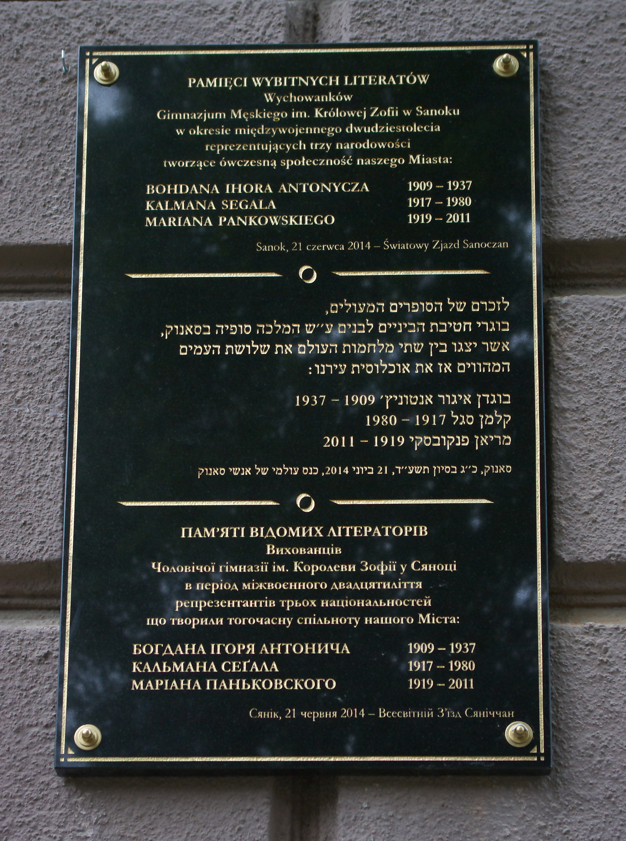 Tablica poświęcona trzem absolwentom gimnazjum, którymi byli literaci trzech narodowości: Ukrainiec Bohdan Ihor Antonycz (1909-1937), Żyd Kalman Segal (1917-1980) i Polak Marian Pankowski (1919-2011). Tablica została umieszczona przy wejściu do budynku i odsłonięta 21 czerwca 2014 podczas Światowego Zjazdu Sanoczan. Inskrypcja głosi: Pamięci wybitnych literatów, wychowanków Gimnazjum Męskiego im. Królowej Zofii w Sanoku w okresie międzywojennego dwudziestolecia reprezentujących trzy narodowości tworzące ówczesną społeczność naszego Miasta: Bohdana Ihora Antonycza 1909–1937, Kalmana Segala 1917–1980, Mariana Pankowskiego 1919–2011. Sanok, 21 czerwca 2014 – Światowy Zjazd Sanoczan.